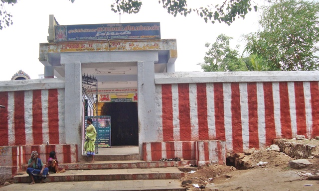 தேவதானப்பட்டி மூங்கிலணை காமாட்சியம்மன் கோயில் முன்பகுதி